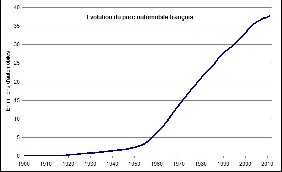 Description Graphique de l'évolution du parc automobile français de 1900 à 2011 Date19 February 2012SourceOwn workAuthorBrucesatto Graphique de l'évolution du parc automobile français de 1900 à 2011